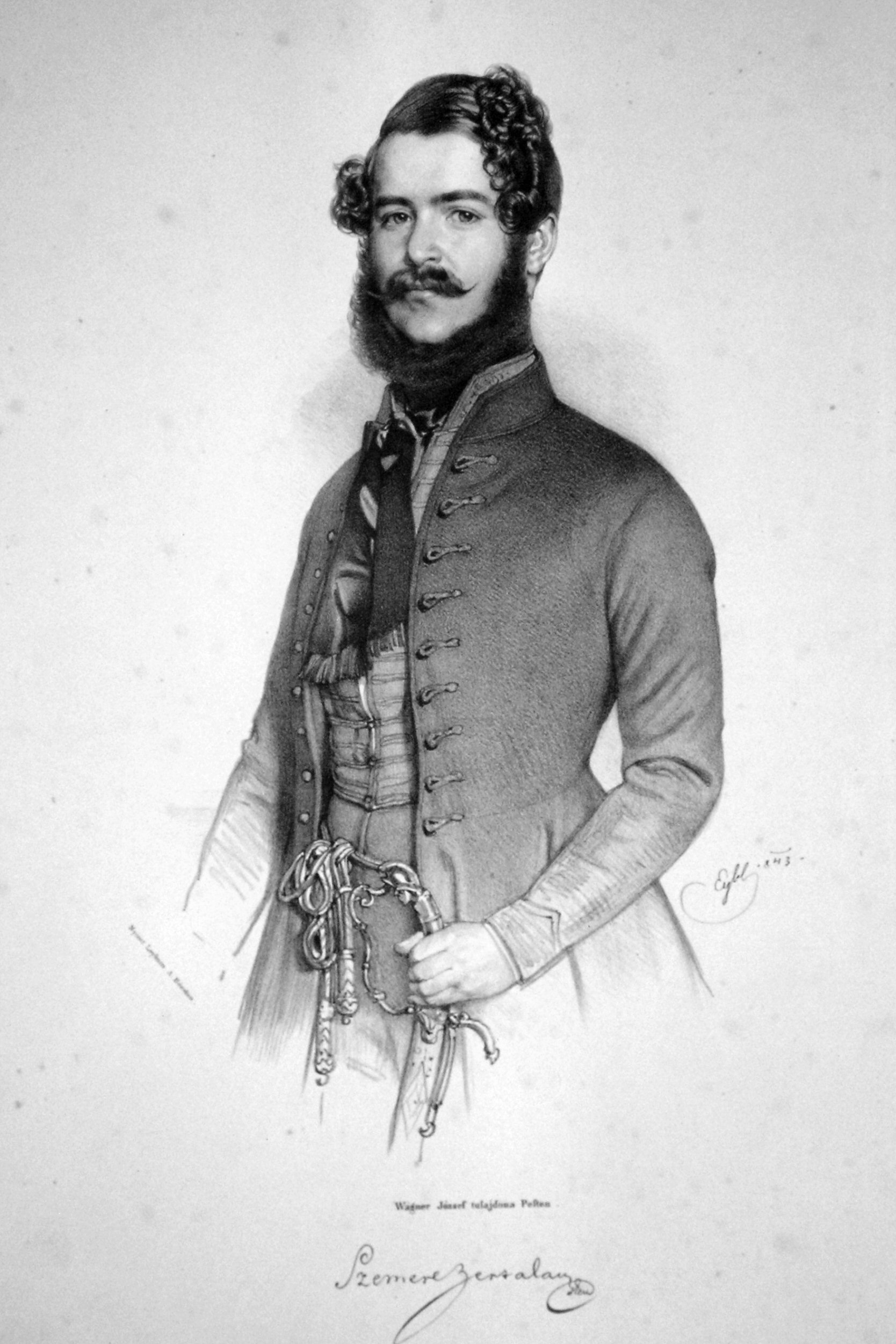 Bertalan Szemere, Lithographie von Franz Eybl, 1843